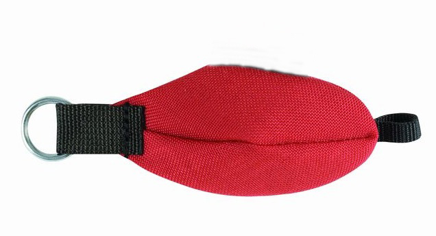 Wurfbeutel für Wurfleinen und Rettungsschnüre